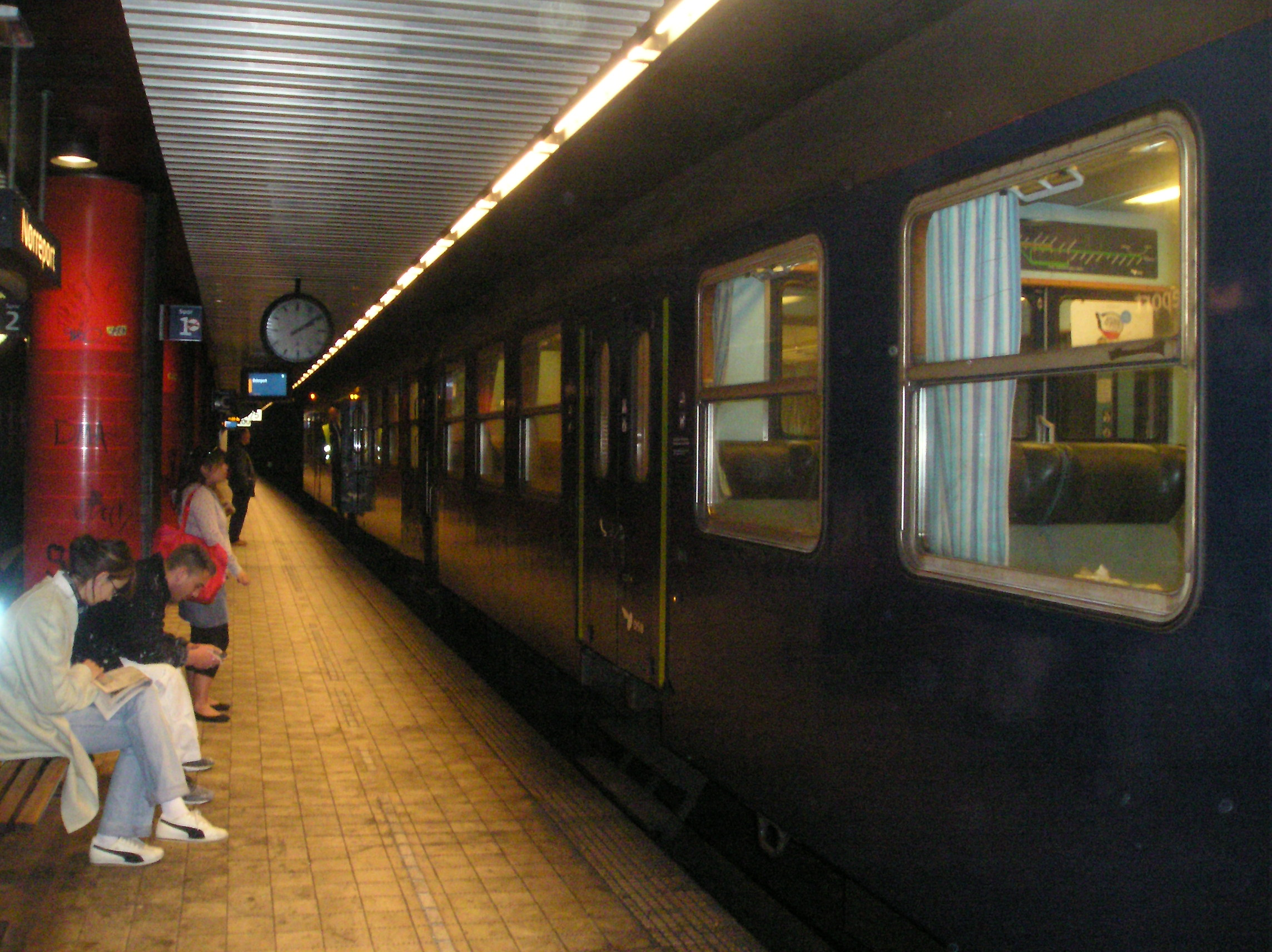 Nørreport Station in Copenhagen.